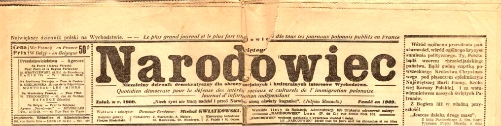 Manchette du quotidien Narodowiec paraissant en France (dans la région Nord-Pas de Calais) en langue polonaise.